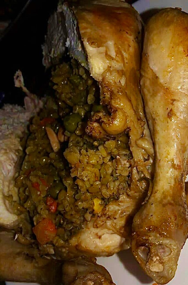 صورة لأكلة الدجاج المحشي، يتم حشو الدجابة بخليط الفريكة والذرة والجزر.